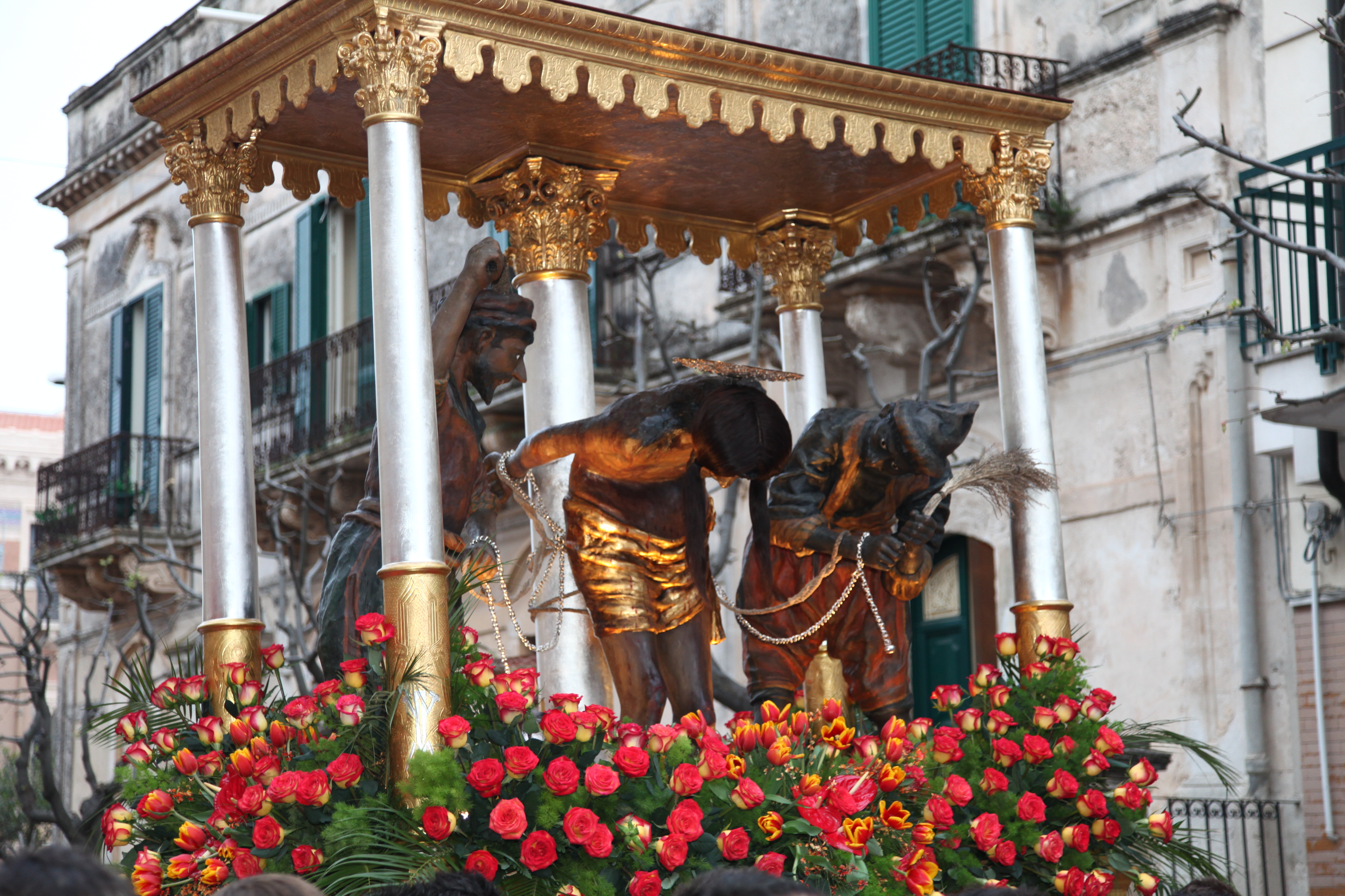 Particolare